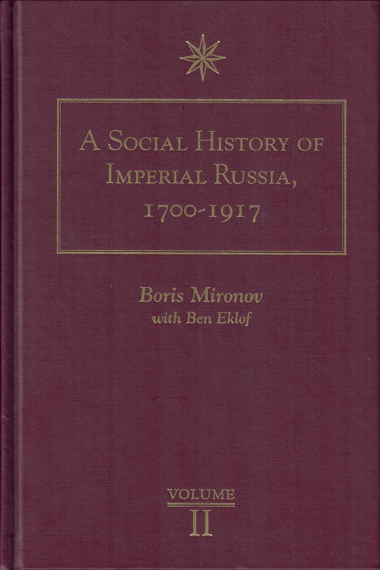 Обложка американского издания